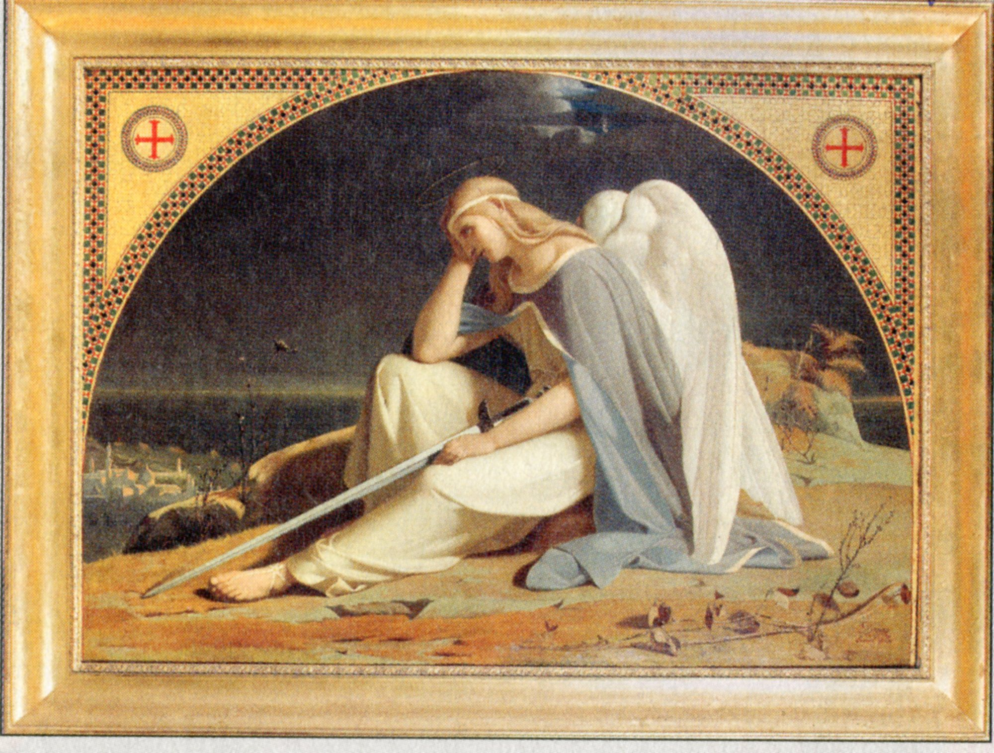 Huile sur toile - 100 x 140 cm Localisation actuelle inconnue Photo : DR